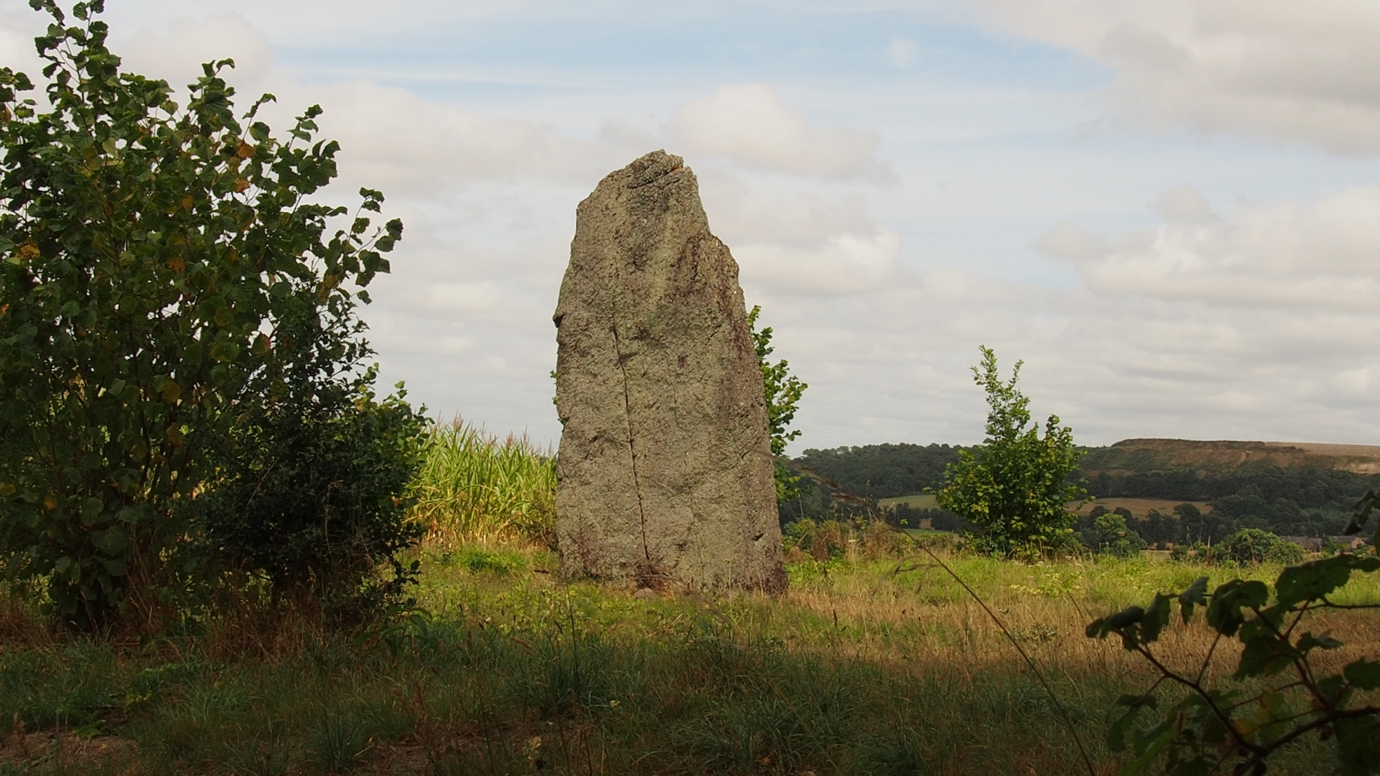 Menhir de la Pierre Longue, Iffendic